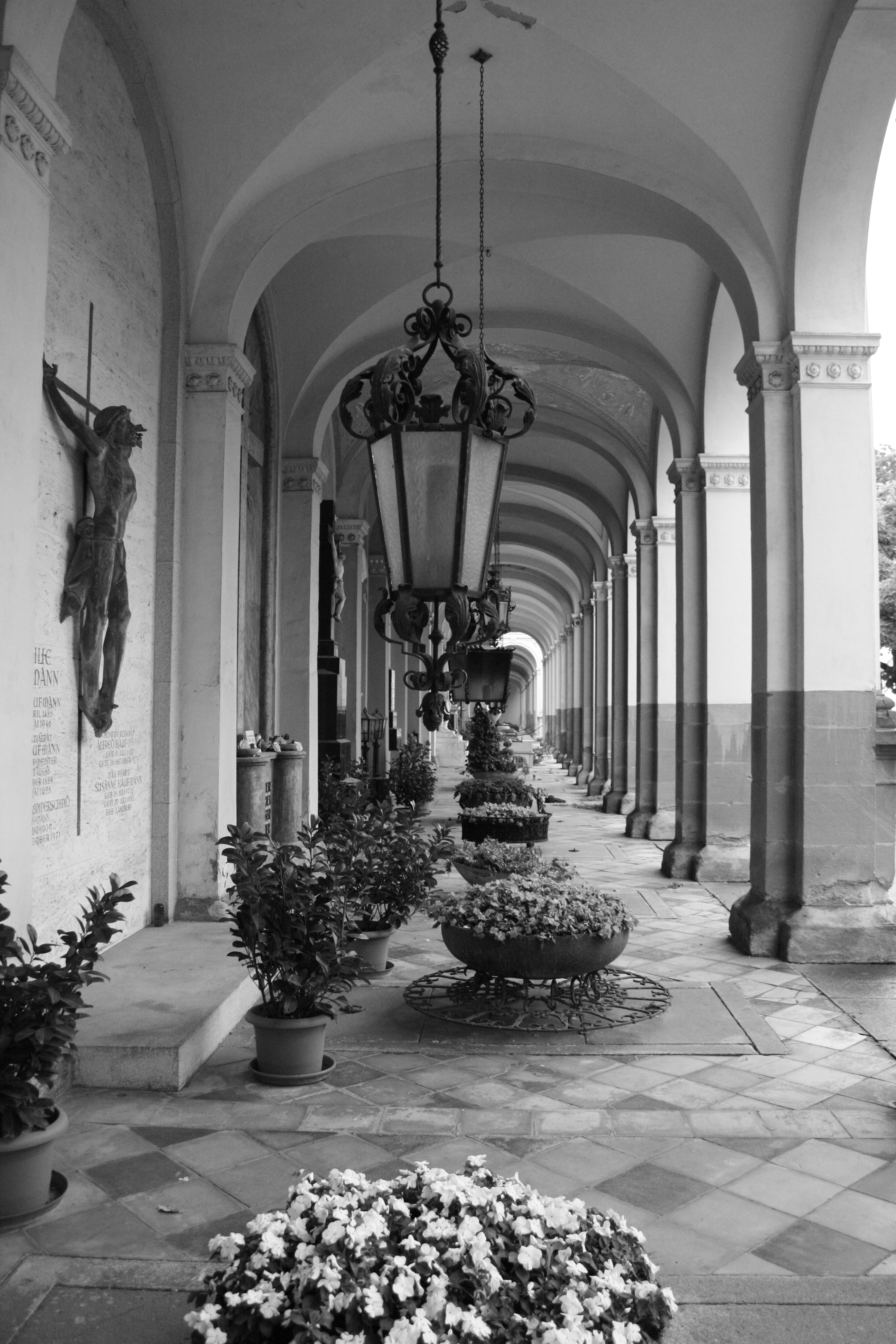 Gesamtanlage Stadtfriedhof Wels, Oberösterreich.